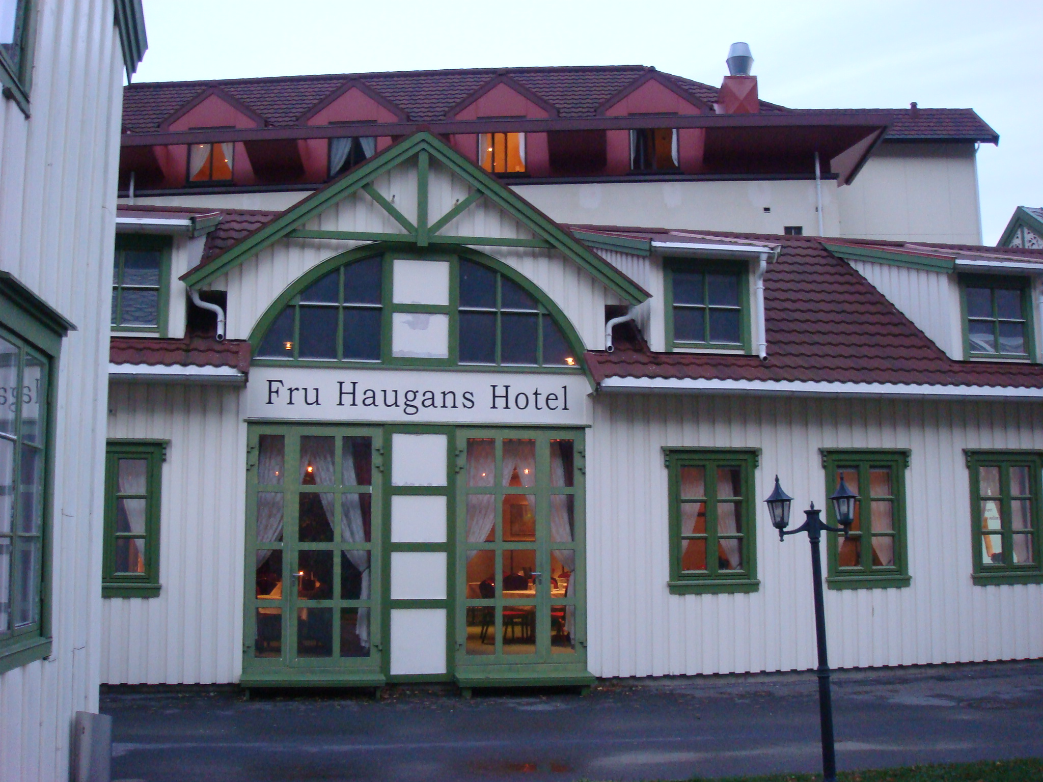 Hotel Fru Haugans (Mosjøen), Noruega Novembro 2007